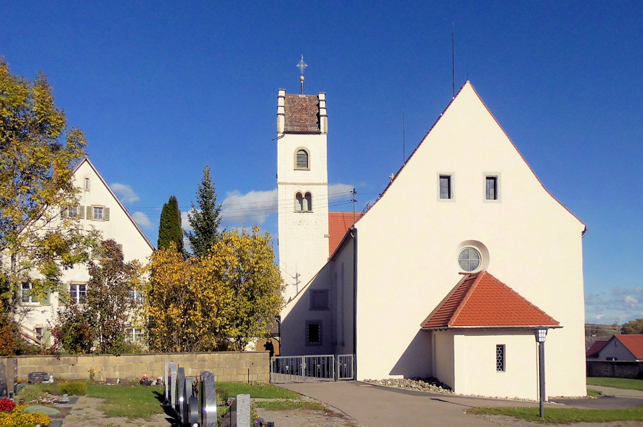 Kirche St. Theopont und Synesius in Hattingen, Gemeinde Immendingen